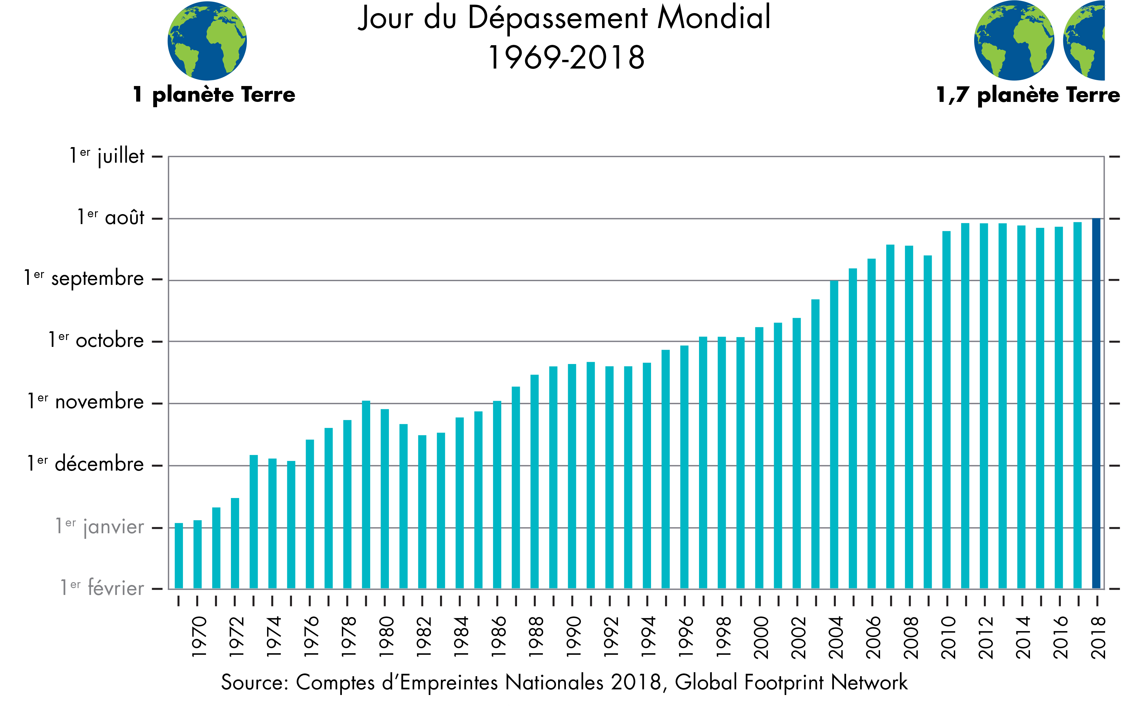 Chaque année, la date du Jour du Dépassement Mondial est calculée en comparant la consommation annuelle de l’humanité en ressources écologiques (Empreinte Ecologique) à la capacité de régénération de la Terre (biocapacité).